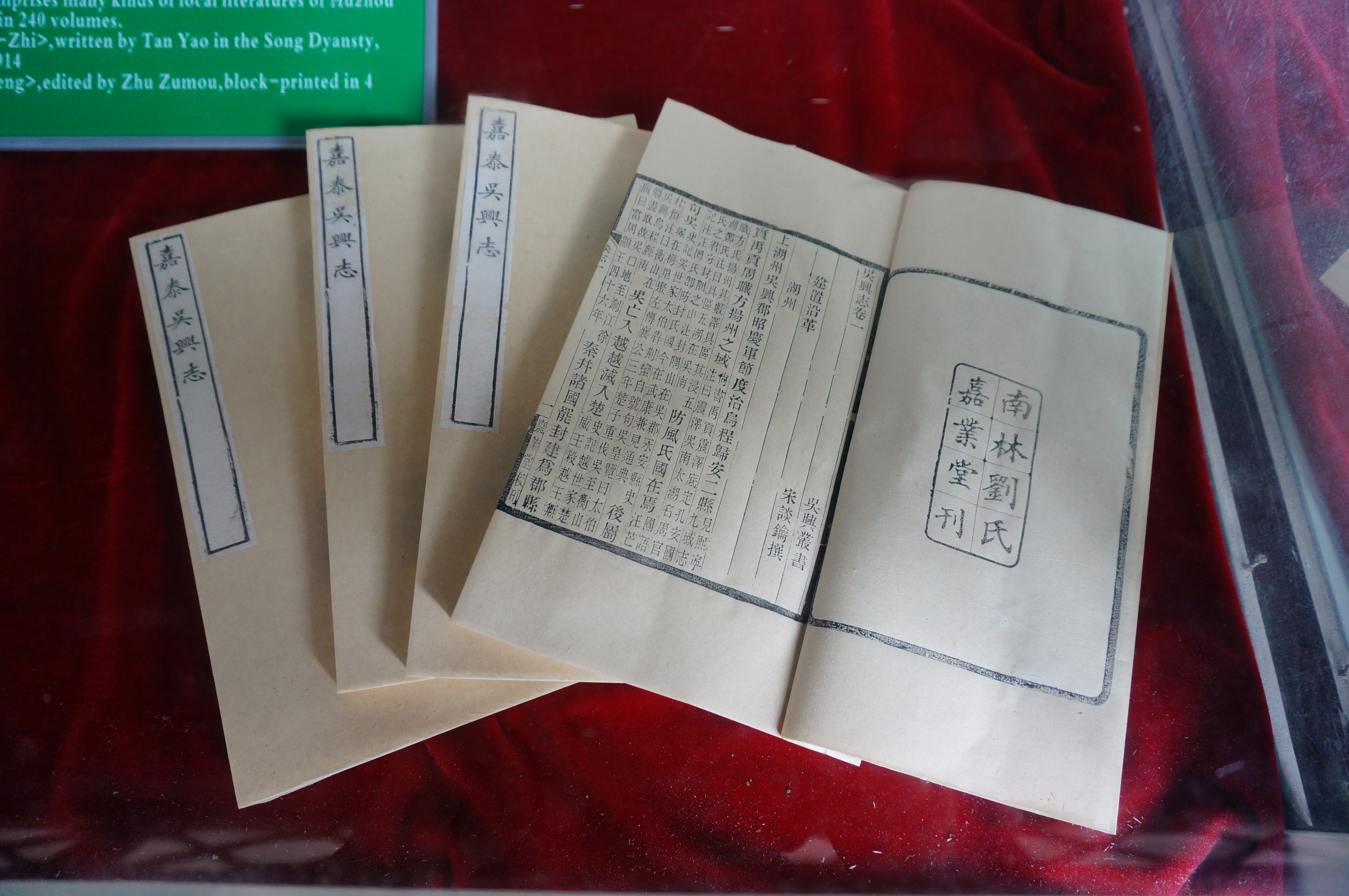 《嘉泰吴兴志》复制品，嘉业堂藏。